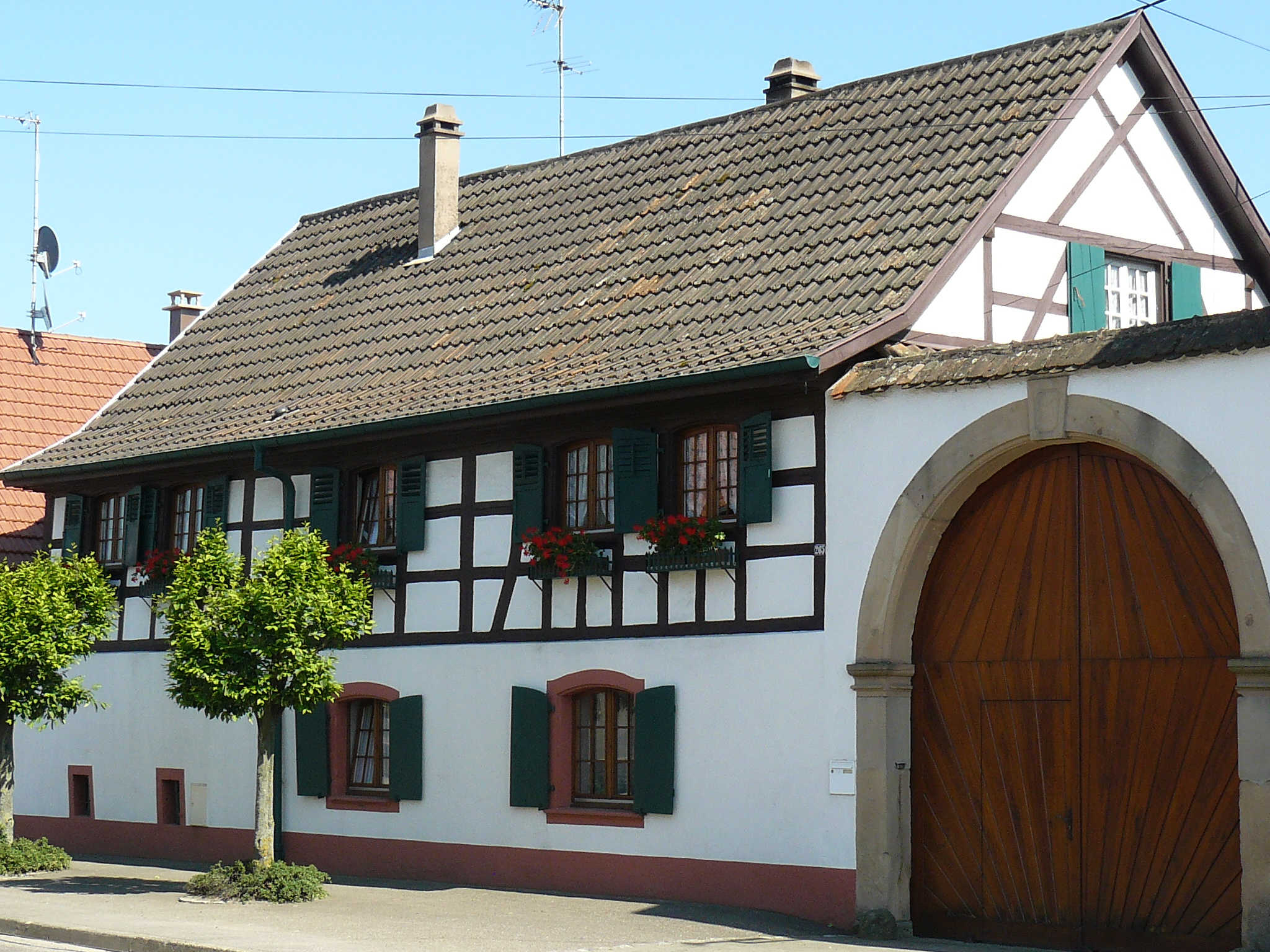 Maison à colombages